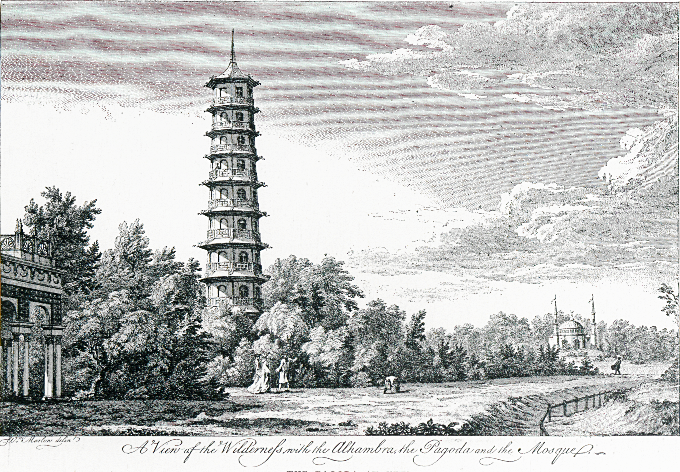 Garden craft in Europe. London 1913. Page 293. Kew graden